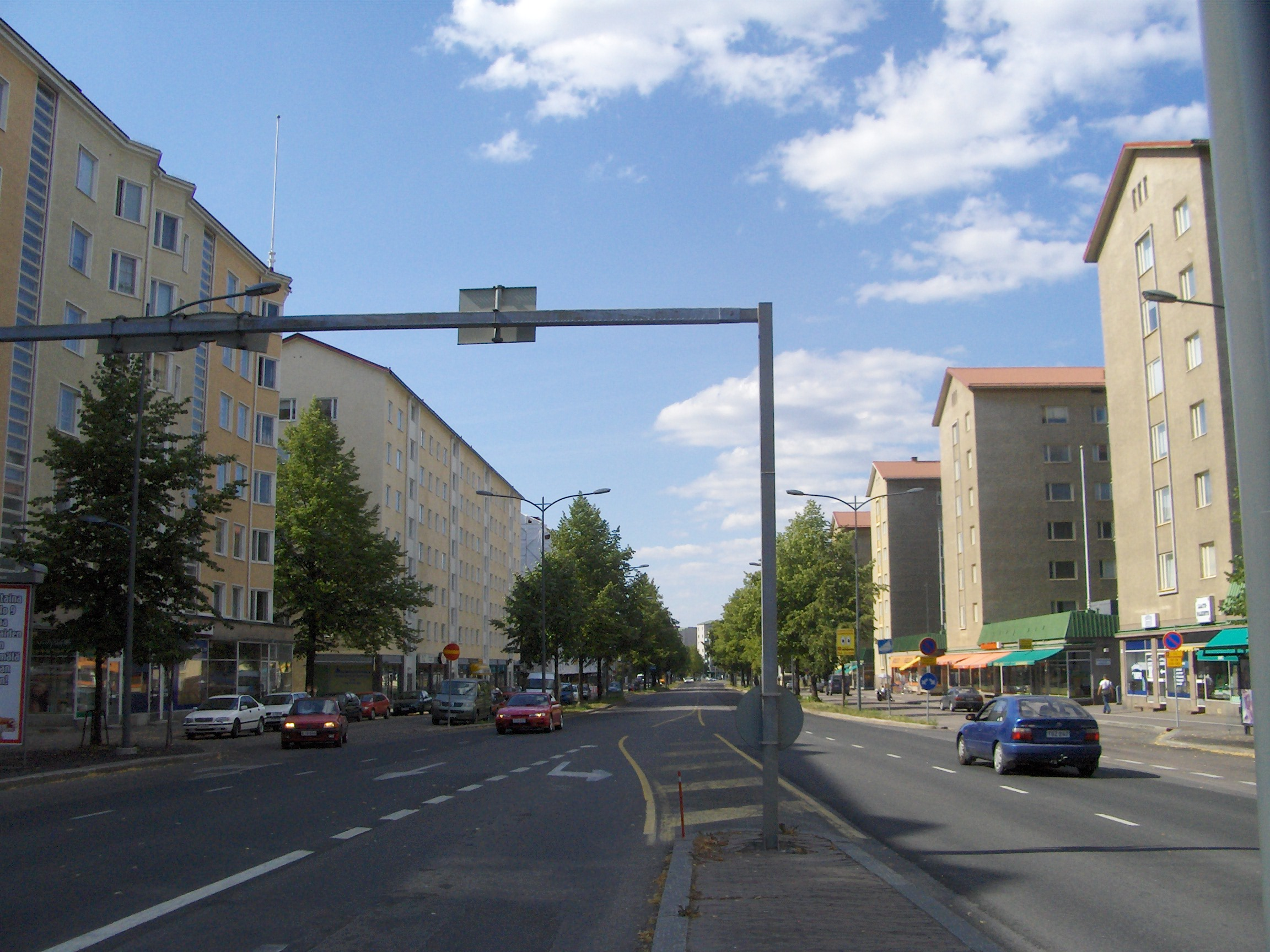 Sammonkatu street in Tampere